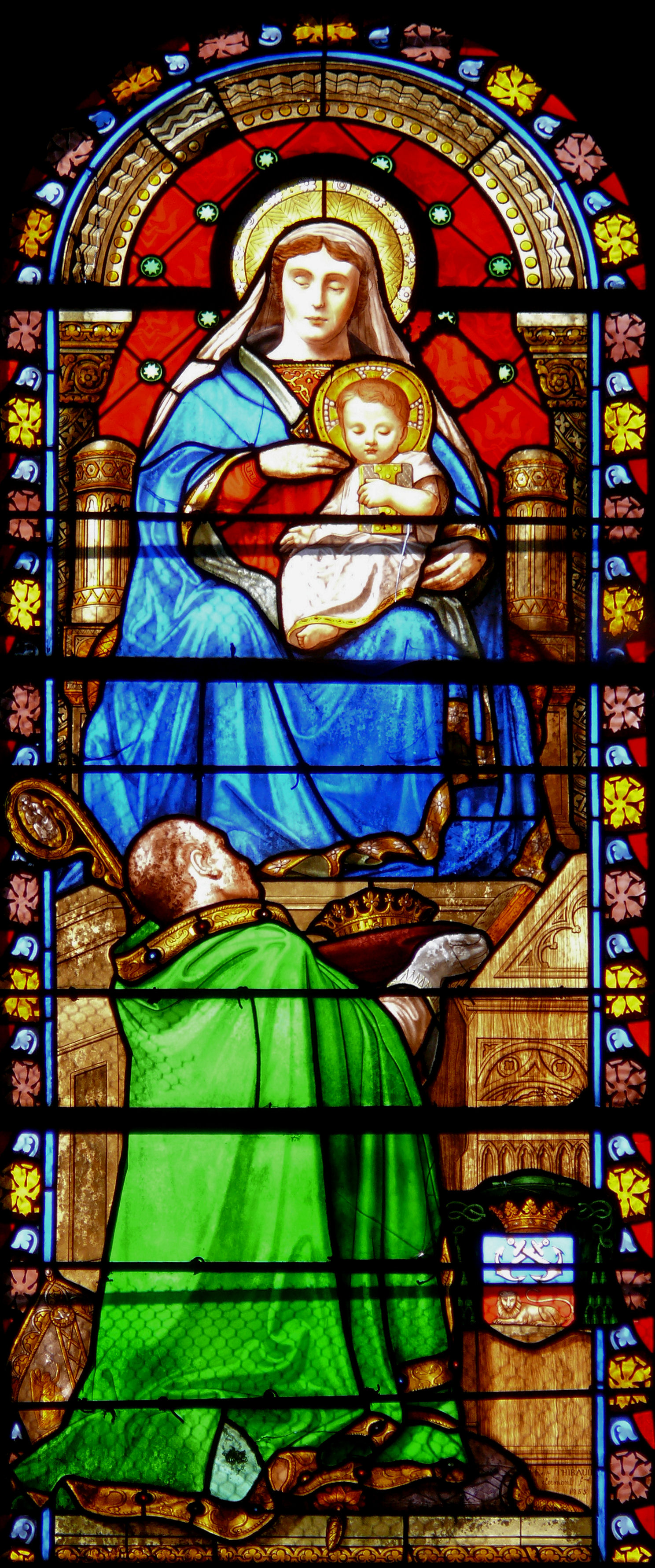 Mauriac - Basilique - Vitrail du croisillon sud du transept